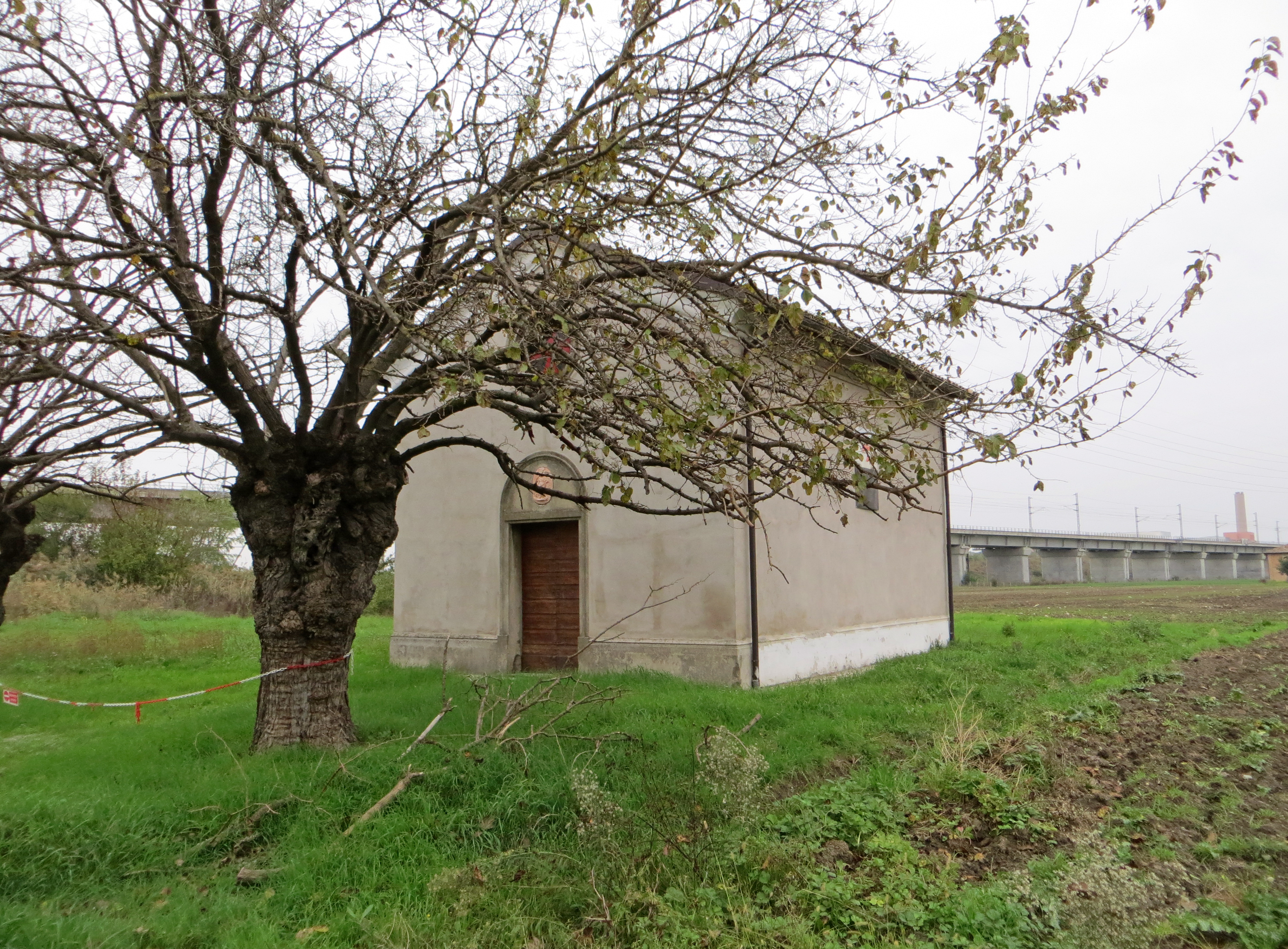 Facciata e lato sud dell'oratorio della Concezione di Maria Vergine